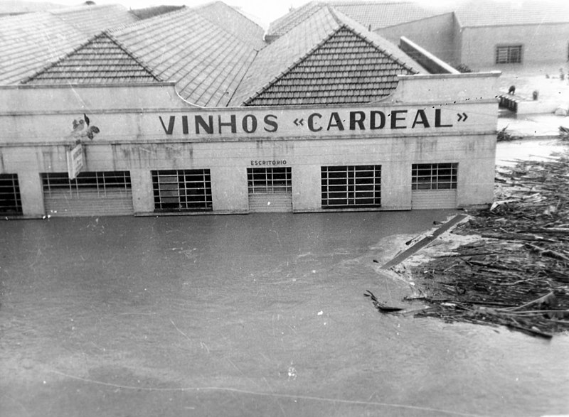 Enchente de 1974 em Tubarão. Fotografia depositada no Arquivo público e Histórico Amadio Vettoretti.